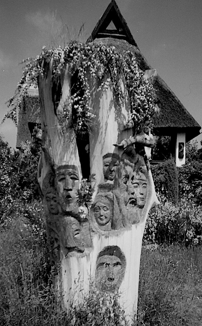 "Gesichterbaum" von Hanns Mehner, aufgestellt vor dem Haus des Kaufmannpaares Irene Hasenberg und Günter Mörler in Kloster/Hiddensee, in dem Mehner im Sommer wohnte. (Standort: Zum Hochland 10, Kloster, Hiddensee - 2003 zerstört)